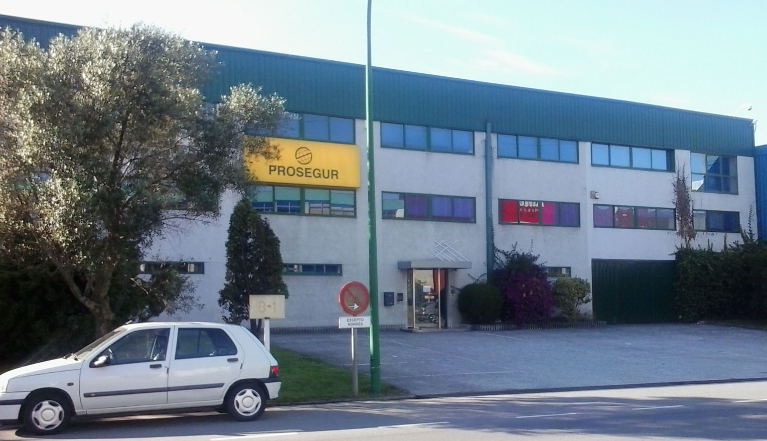 Sede de Prosegur Nordes en Pocomaco A Coruña Galiza Spain